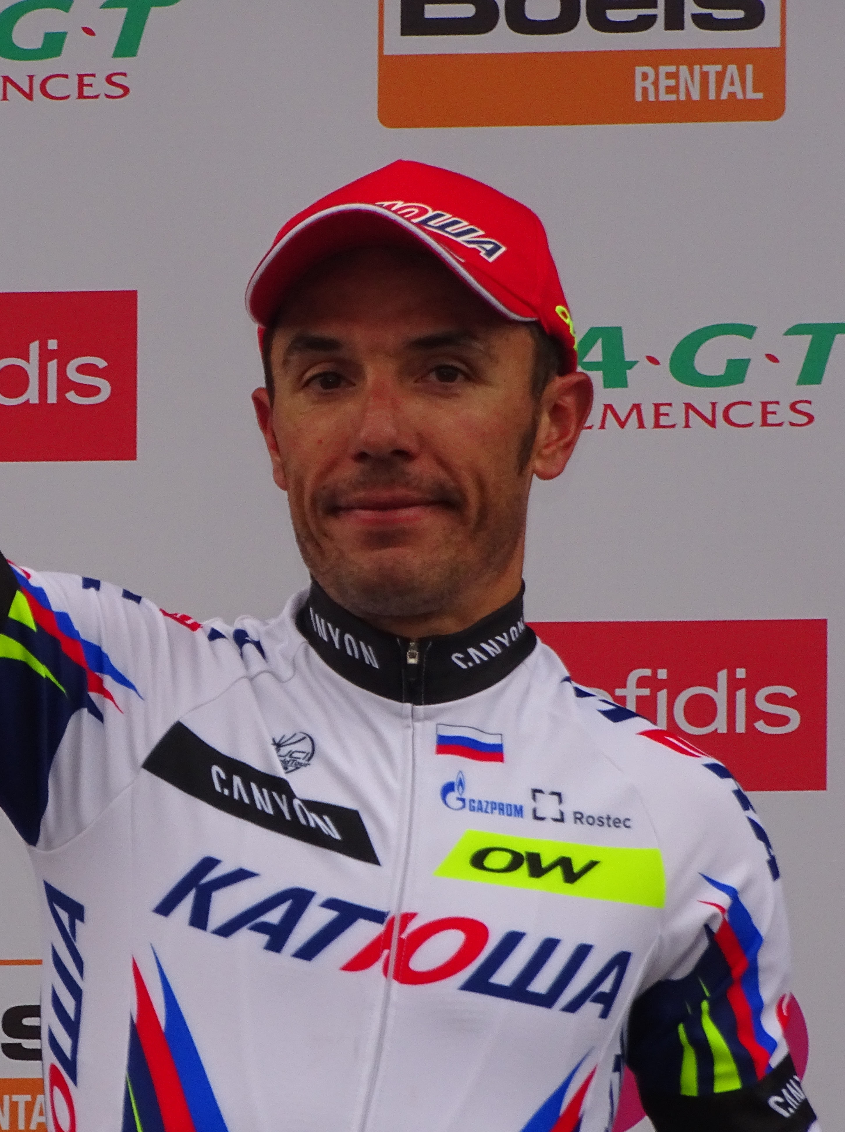 Reportage réalisé le dimanche 26 avril à l'occasion de l'arrivée de Liège-Bastogne-Liège 2015 à Ans, Belgique.